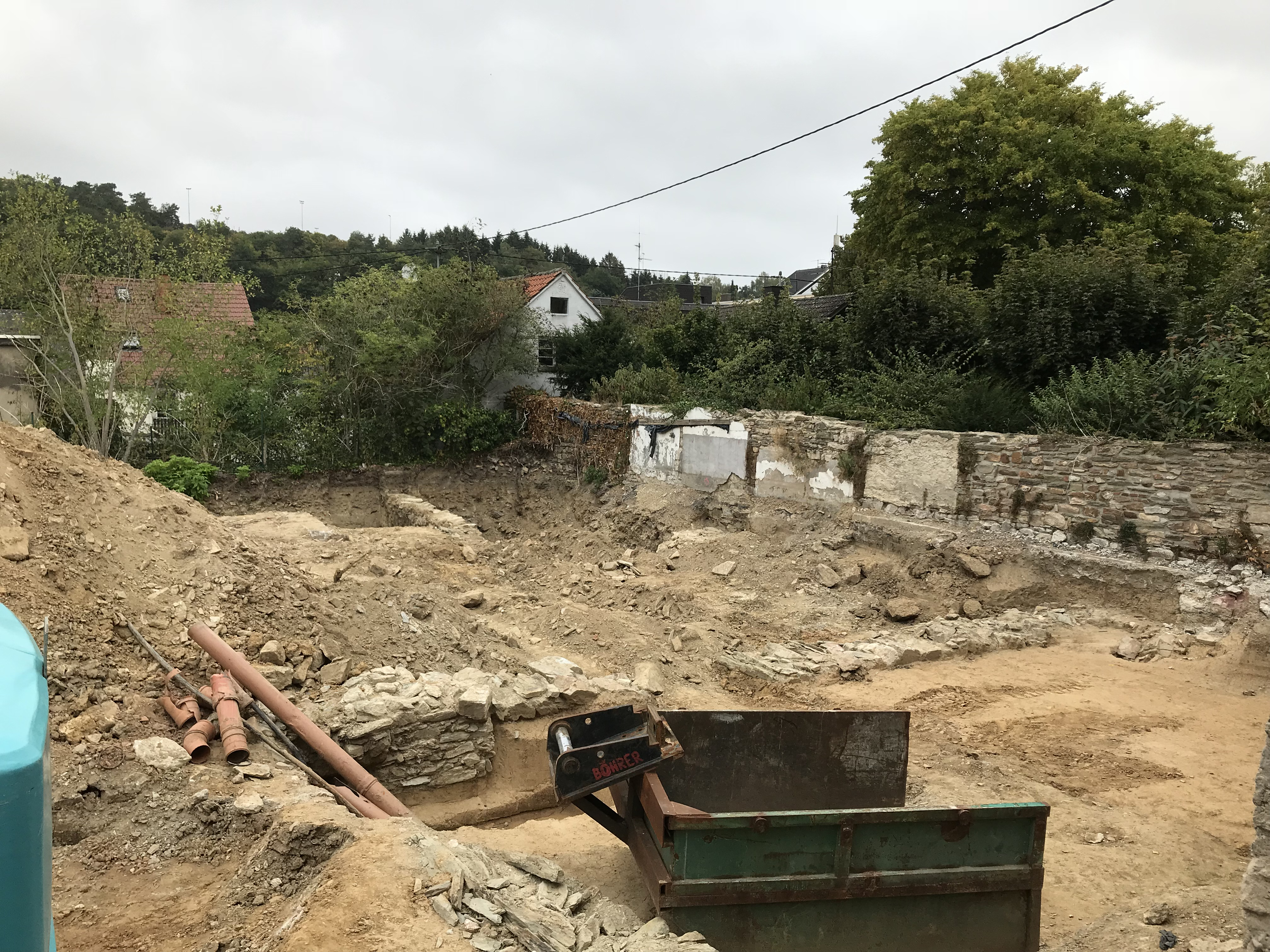 Archäologische Grabung am Schloss in Taunusstein-Wehen, nach Fund von Mauerresten auf einer Baustelle